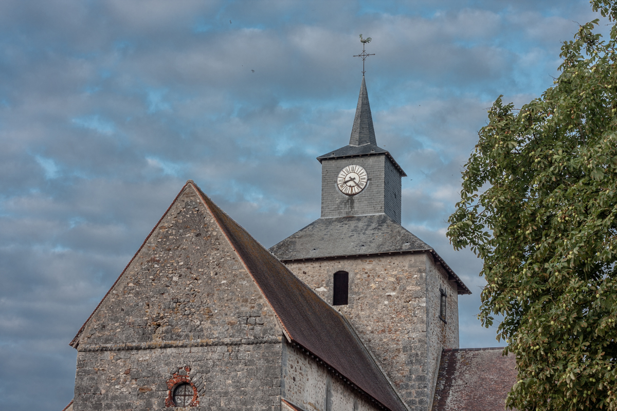 Vert-Toulon, Champagne-Adernne. France.